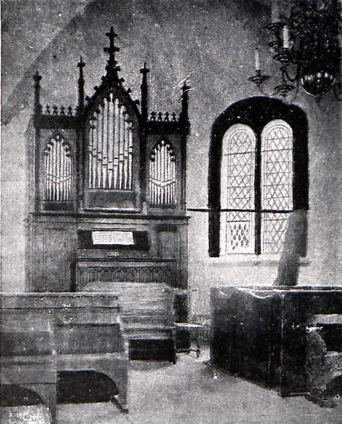 Einstige Orgel der St. Jürgen-Kapelle